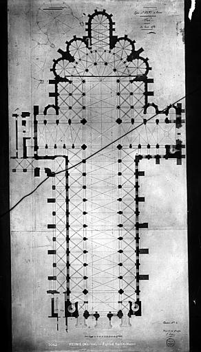 Dessin.